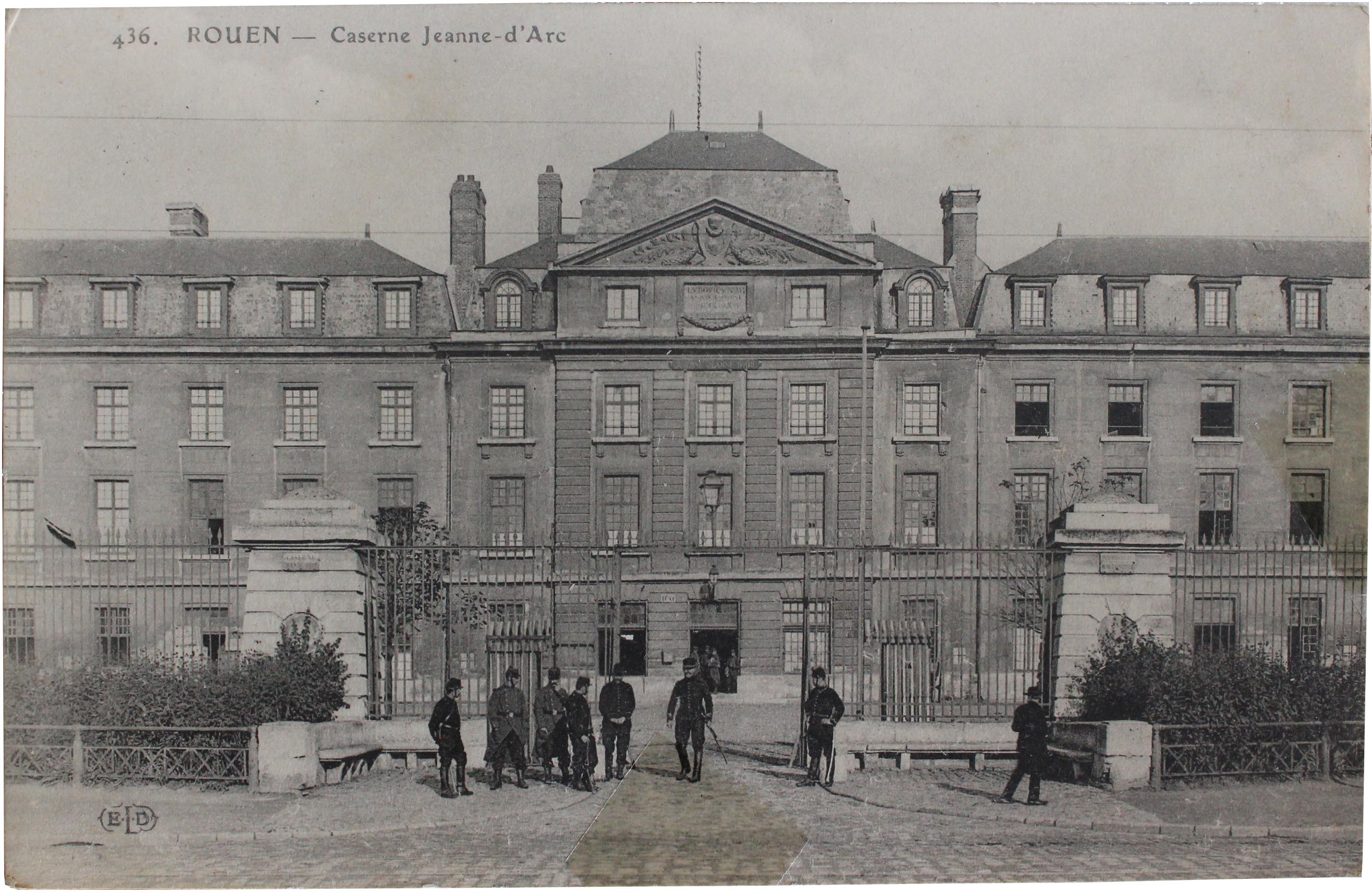 Carte postale de 1913 présentant la façade principale de la caserne Jeanne d'Arc de Rouen.